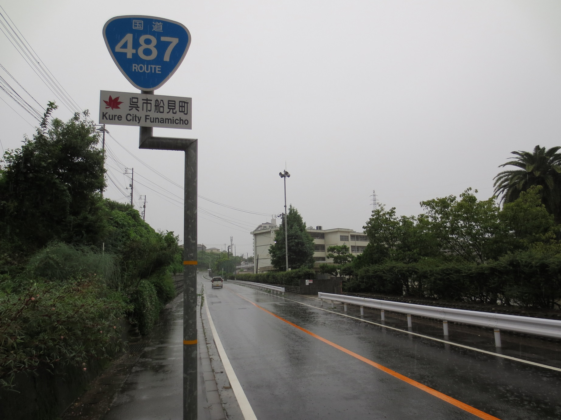 呉市船見町付近の国道487号。